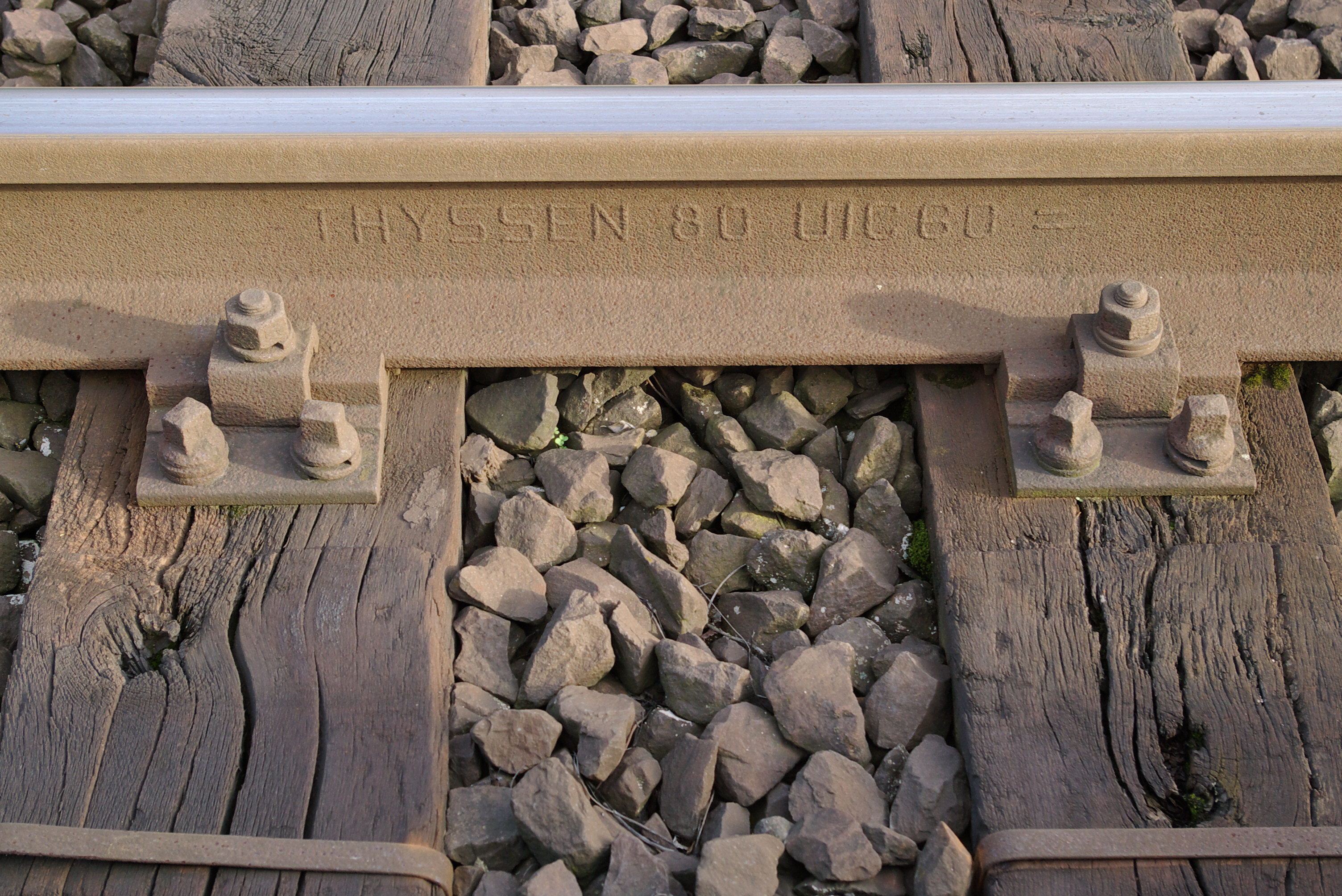 Schienenbefestigung, Oberbau K, im Bahnhof Dortmund-Kurl